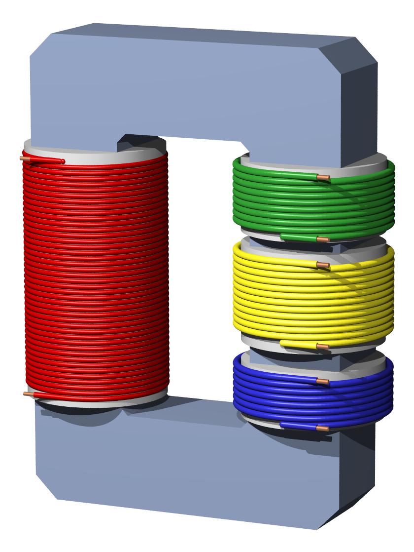 Transformator med tre sekundärspolar